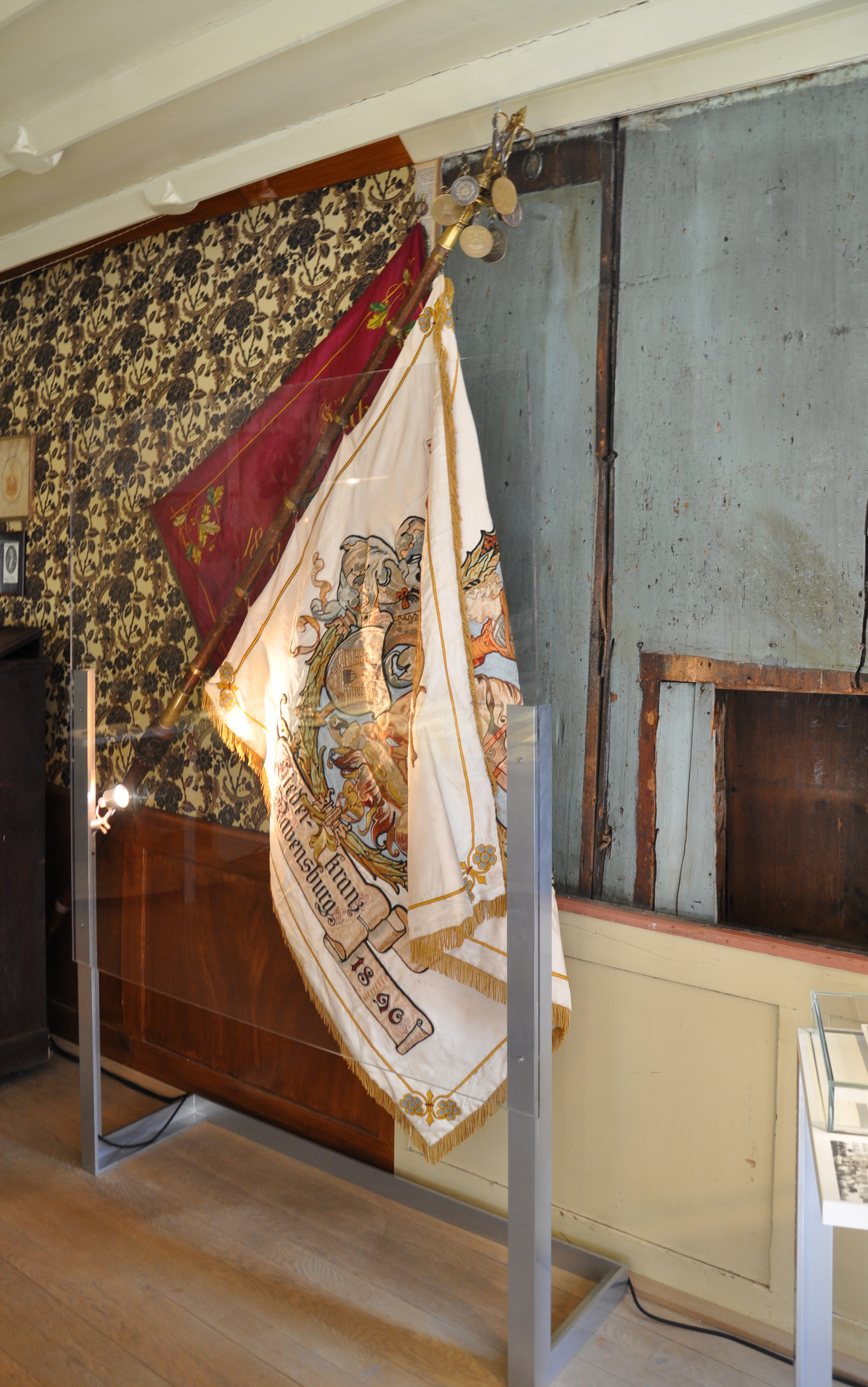 Fahne des Liederkranzes Ravensburg, 1896; Ravensburg, Museum Humpis-Quartier (Leihgabe des Oratorienchors Liederkranz Ravensburg) Humpis-Quartier Native nameMuseum Humpis-QuartierLocationRavensburg, GermanyCoordinates47° 46′ 49.8″ N, 9° 36′ 57.24″ E Established2009Web page control : Q1637298 VIAF: 128828875 LCCN: nb2007020847 GND: 4565586-8 WorldCat institution QS:P195,Q1637298